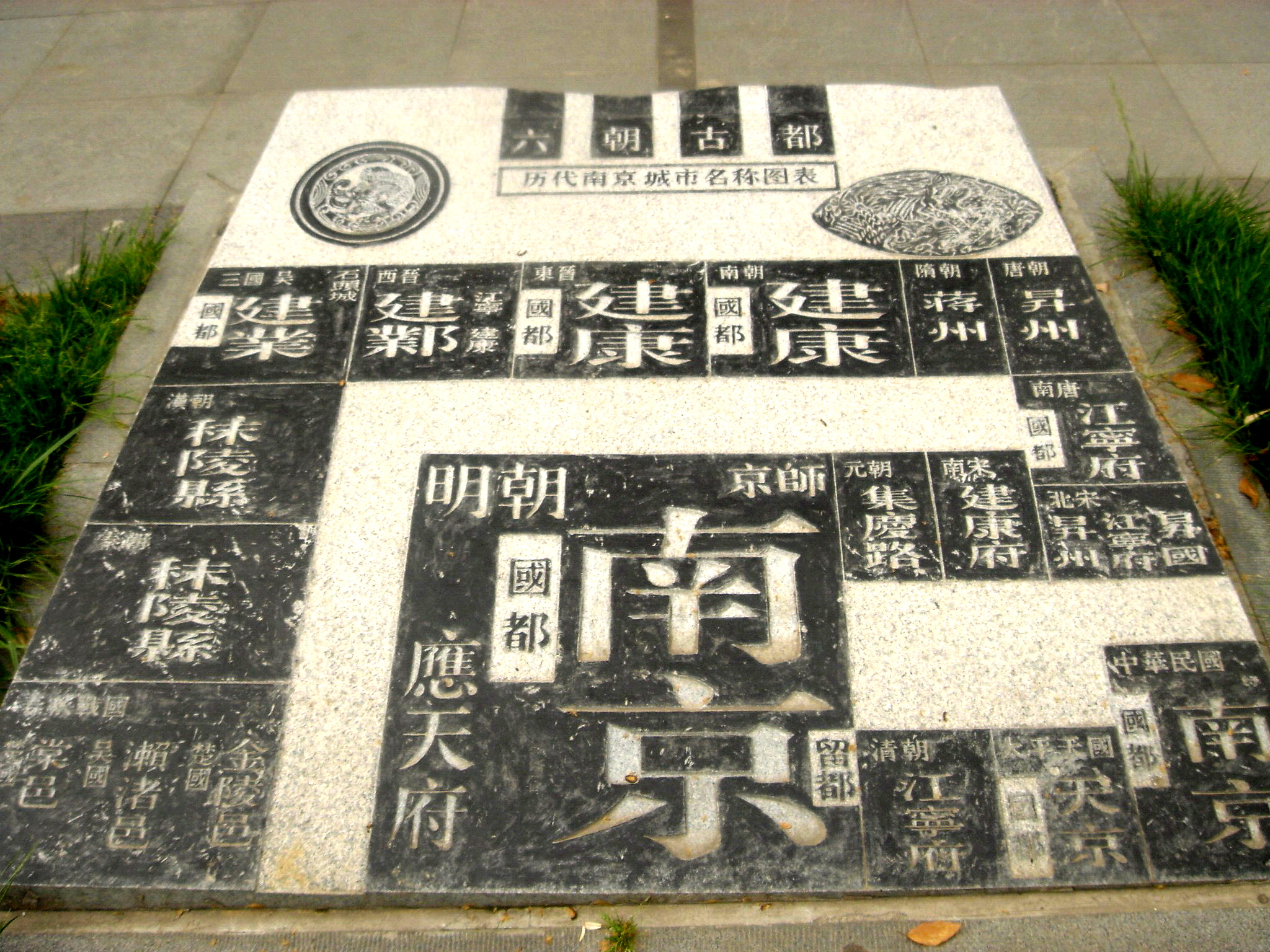 南京东华门旁的历代南京名称图